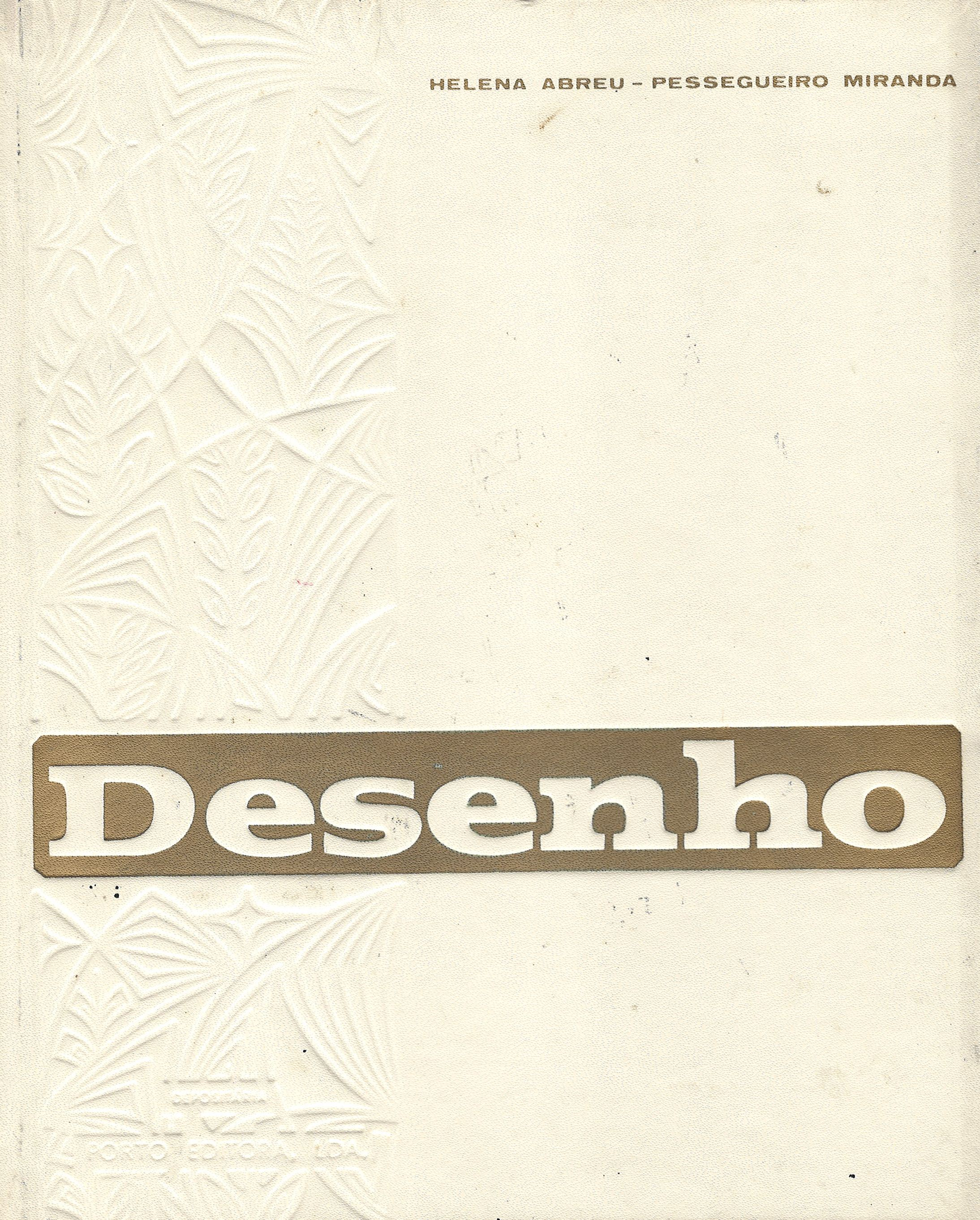 Capa do Livro "Desenho" por Helena Abreu e Francisco Pessegueiro